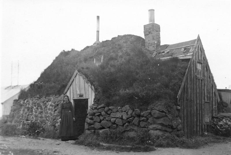 Polarfahrt mit dem Dampfer "München".- Altes Haus in Reijkjavik 17. Juli - 12. August 1925 Information added by Wikimedia users.